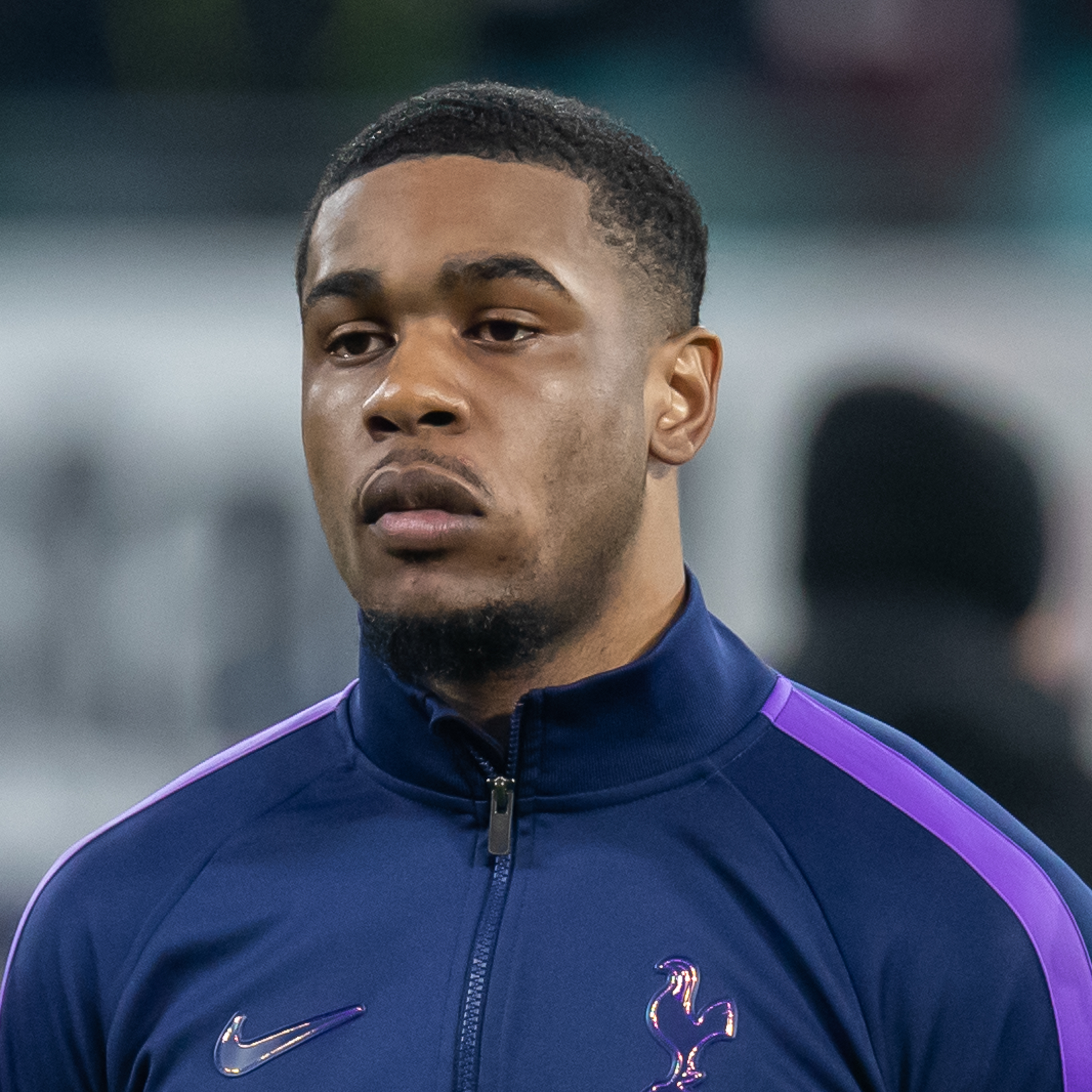 Fußball, Männer, UEFA Champions League Achtelfinale, RB Leipzig - Tottenham Hotspur; Japhet Tanganga (Tottenham Hotspur, 39)